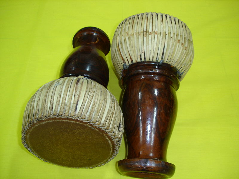 โทนชาตรี